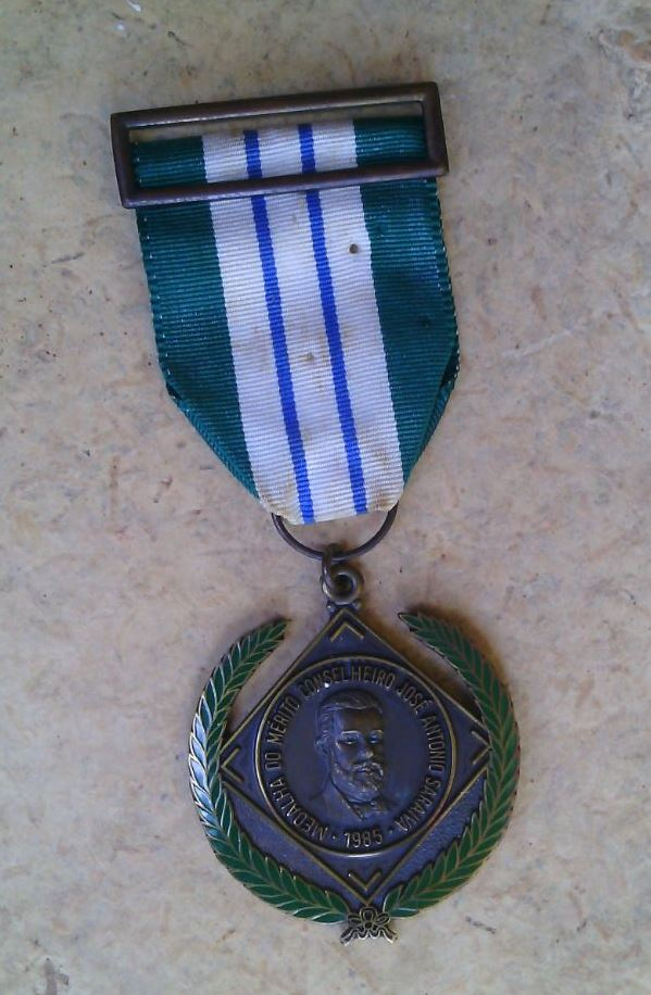 Medalha do Mérito Conselheiro José Antônio Saraiva, do município de Teresina, capital do estado brasileiro do Piauí.